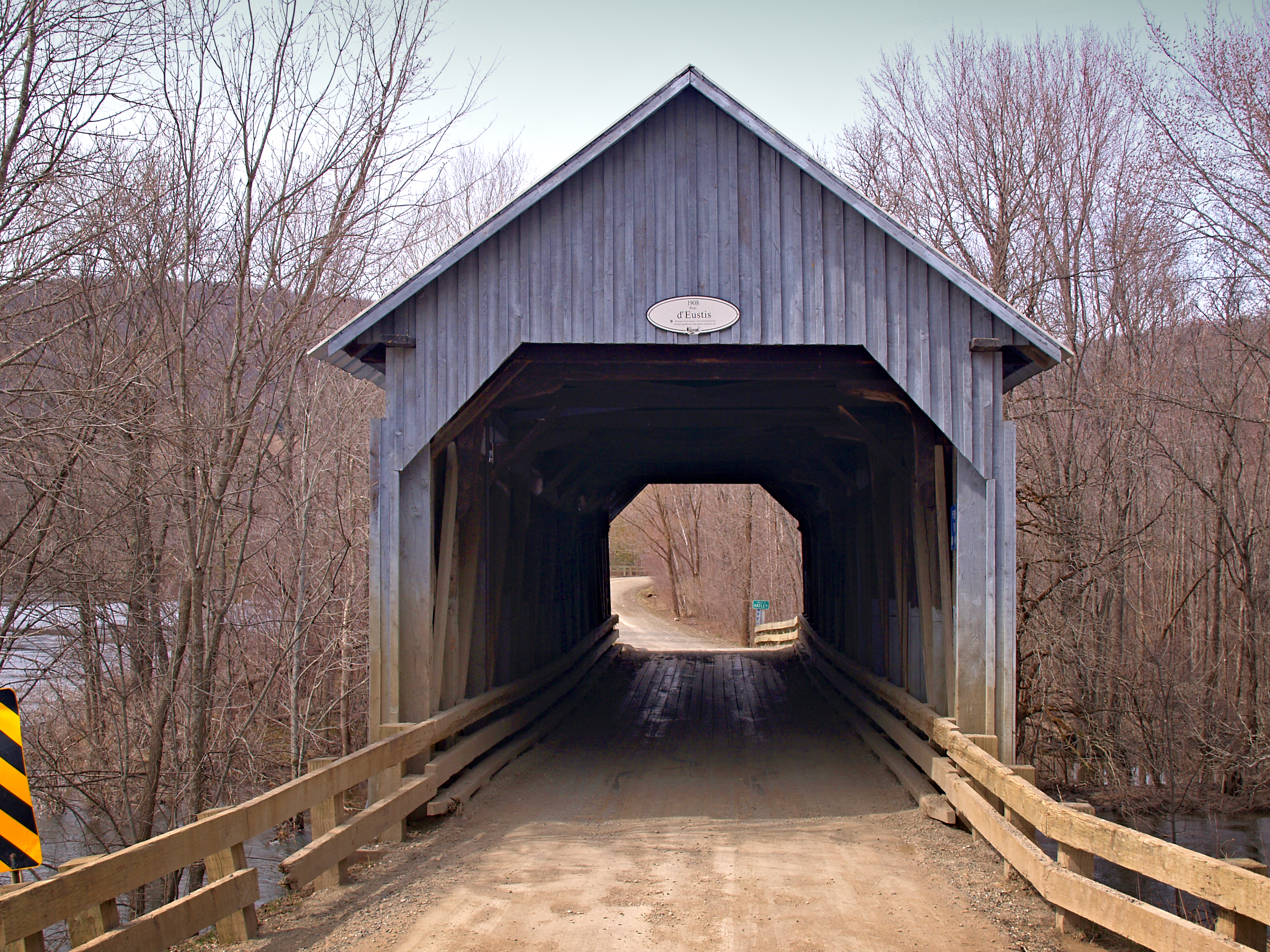 Waterville (Québec) - Vue frontale